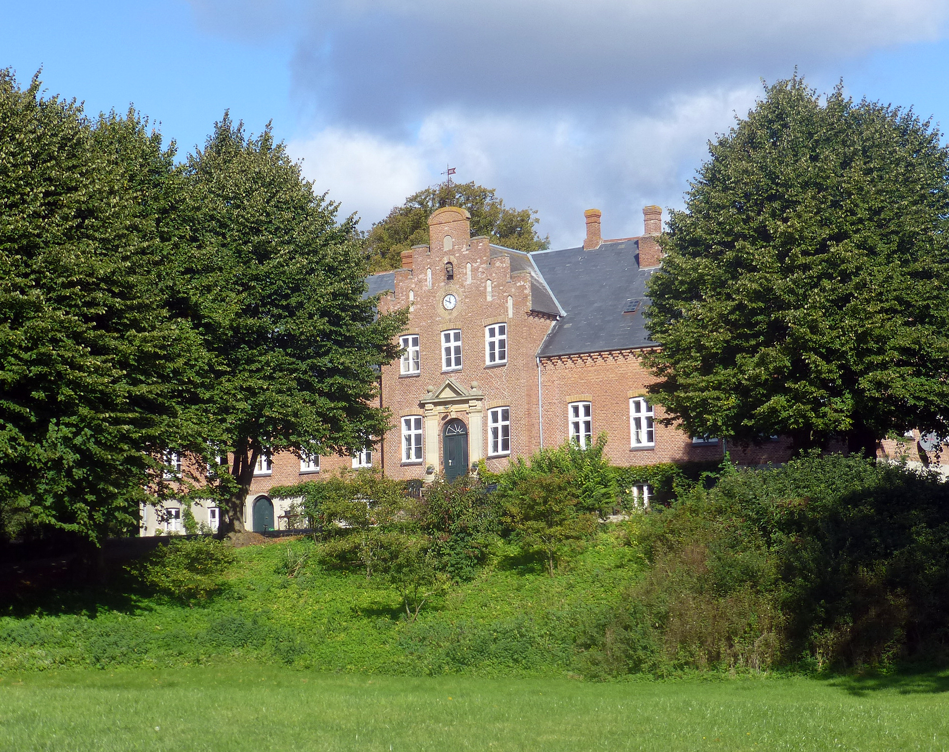 Høegholm set fra syd, 2012